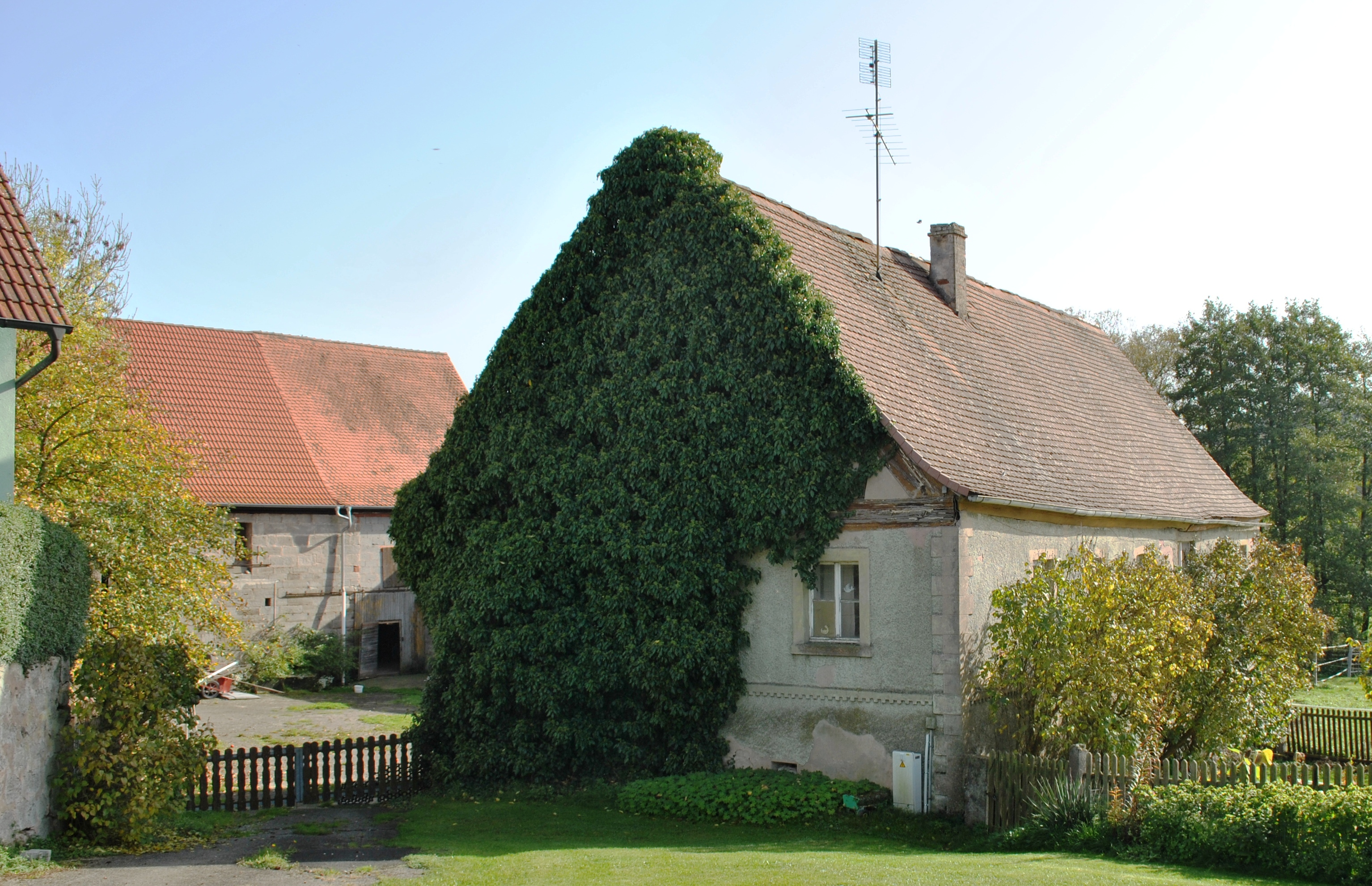 Hutzelmühle, Wasserberndorf, Geiselwind, Landkreis Kitzingen, Unterfranken Bayern